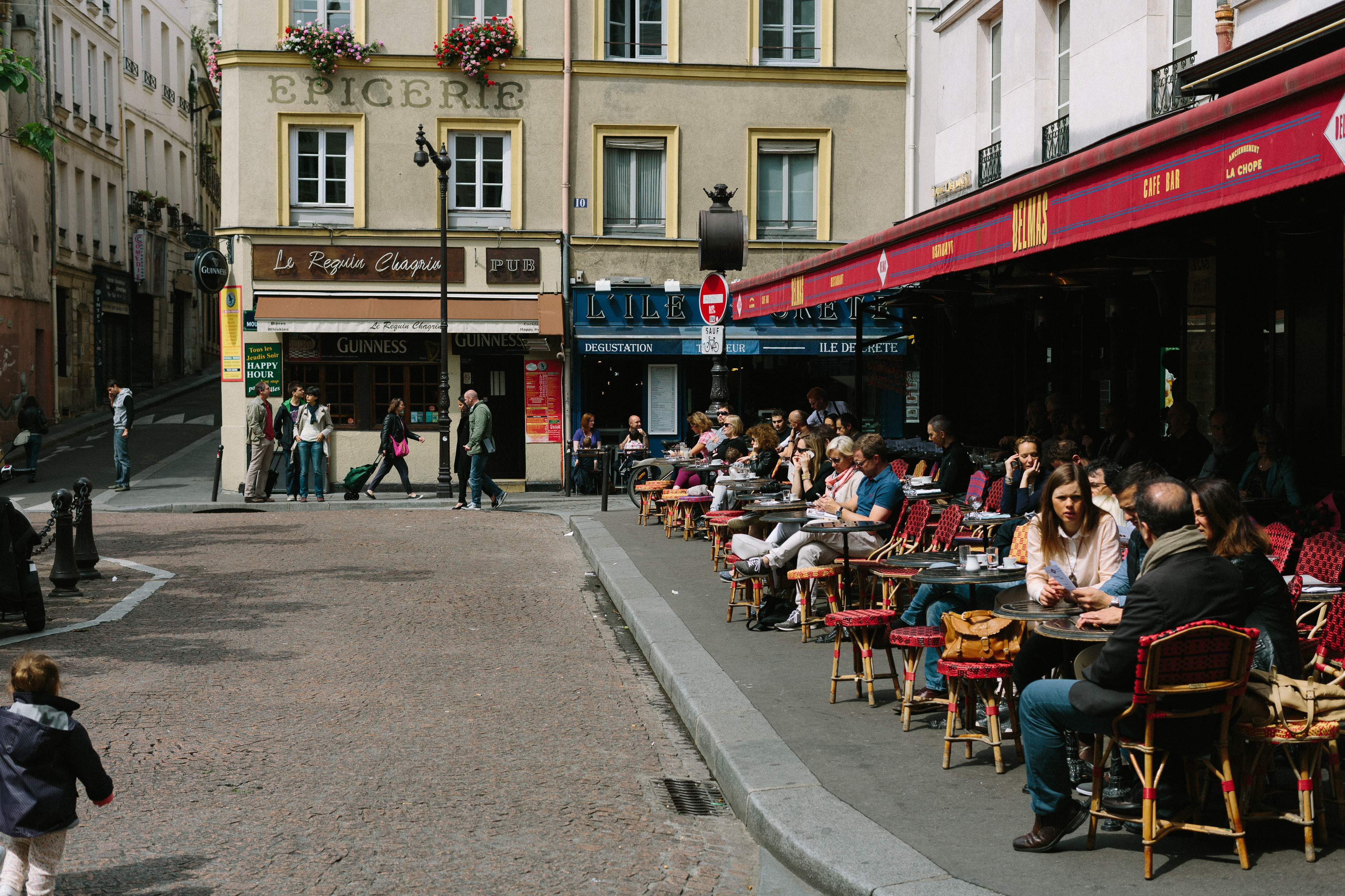 Café Delmas, 2 Place de la Contrescarpe, 75005 Paris, France.